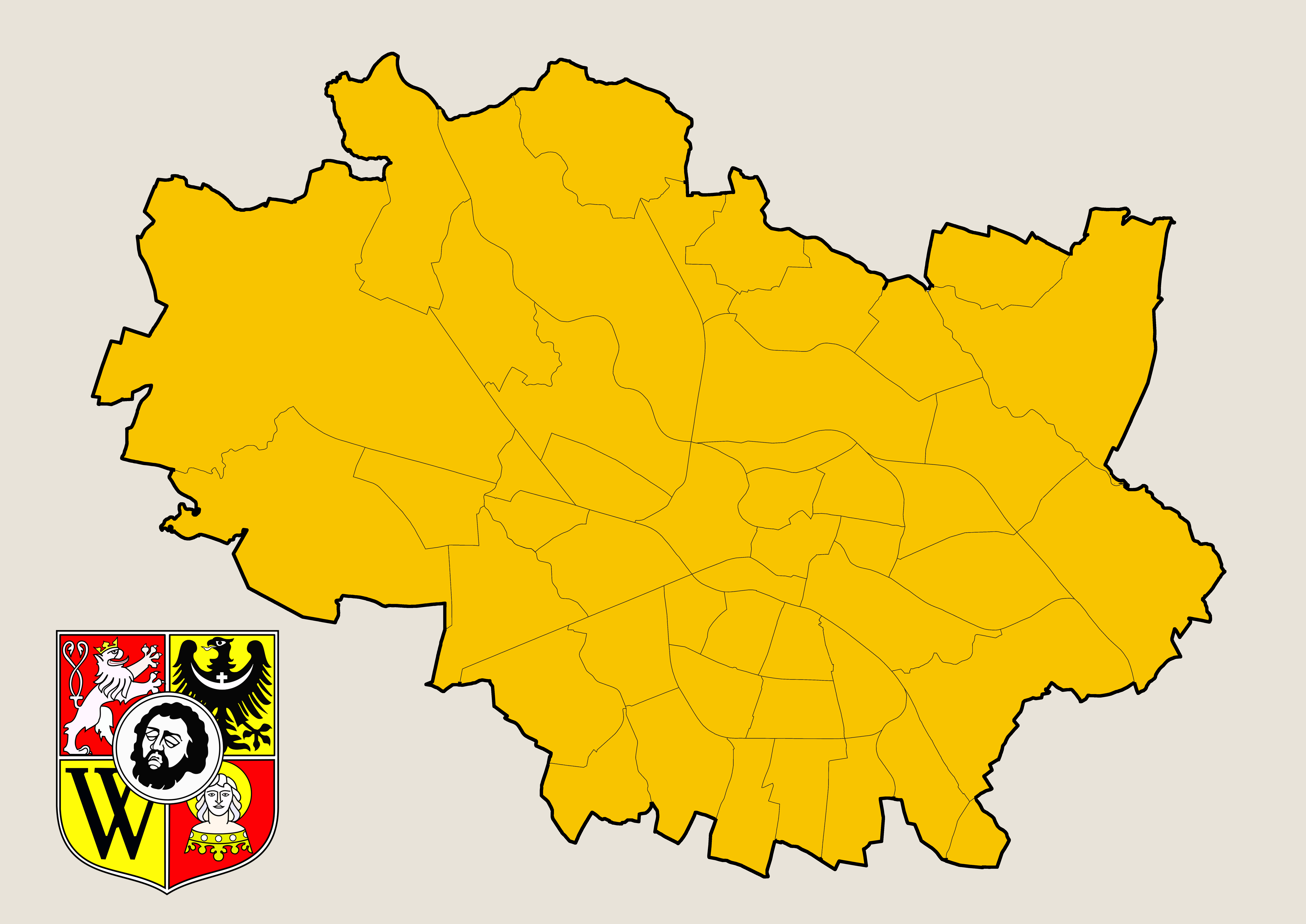 Jednostki pomocnicze (osiedla) Wrocławia na podstawie uchwały nr XX/419/16 Rady Miejskiej Wrocławia z 21 stycznia 2016 roku. Inspirowana grafiką "Poznań - jednostki pomocnicze od 2011.png" użytkownika "Poznaniak".